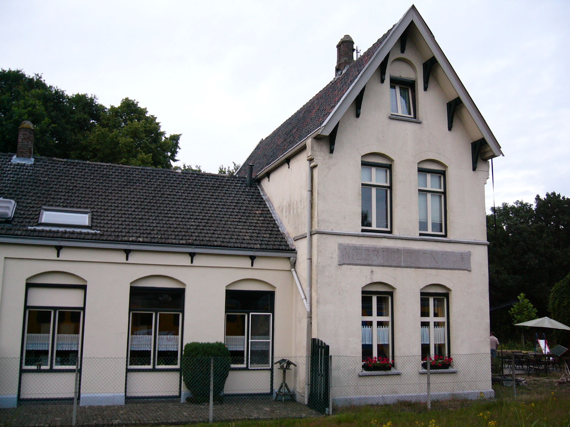 Voormalig station Meerlo-Tienray aan de Maaslijn. Stationsgebouw type Hemmen.